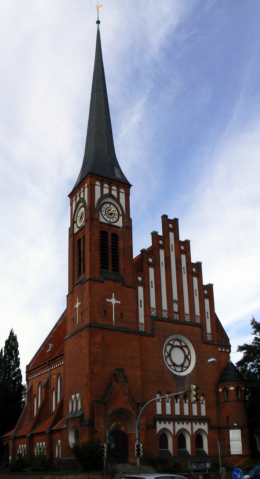 Ansgarkirche in Kiel (eingeweiht am 25. März 1903).